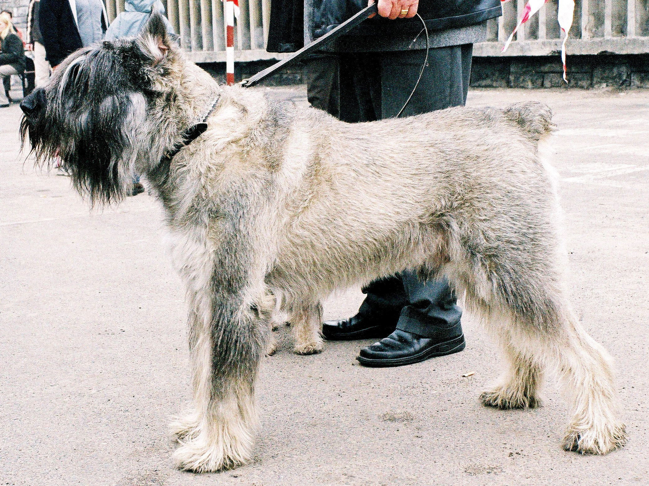 autor: Pleple2000 14:37, 5 April 2006 (UTC)